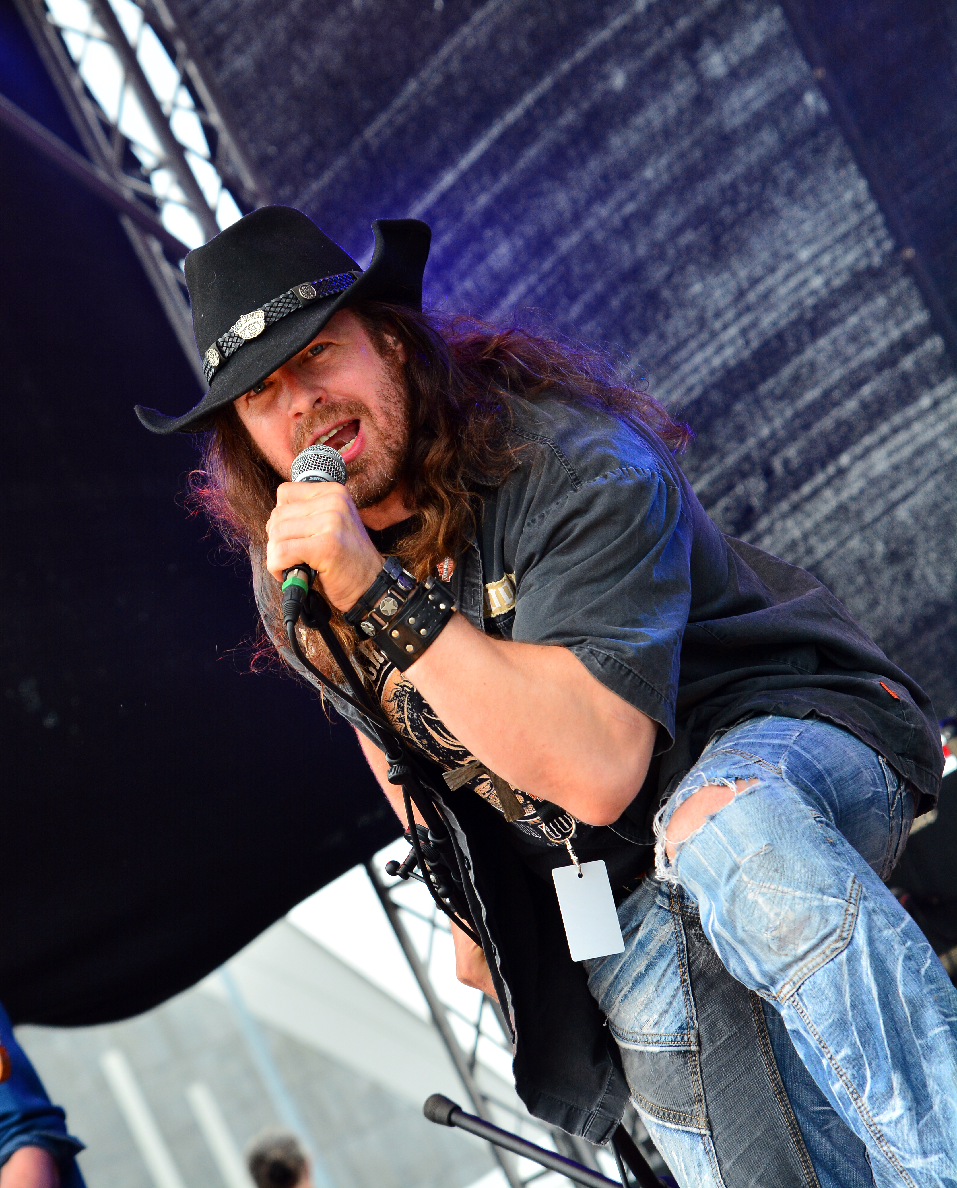 Der Kanadisch-finnische Profi-Wrestler und Sänger der Band Crossfyre, Michael "StarBuck" Majalahti bei den „Hamburg Harley Days“